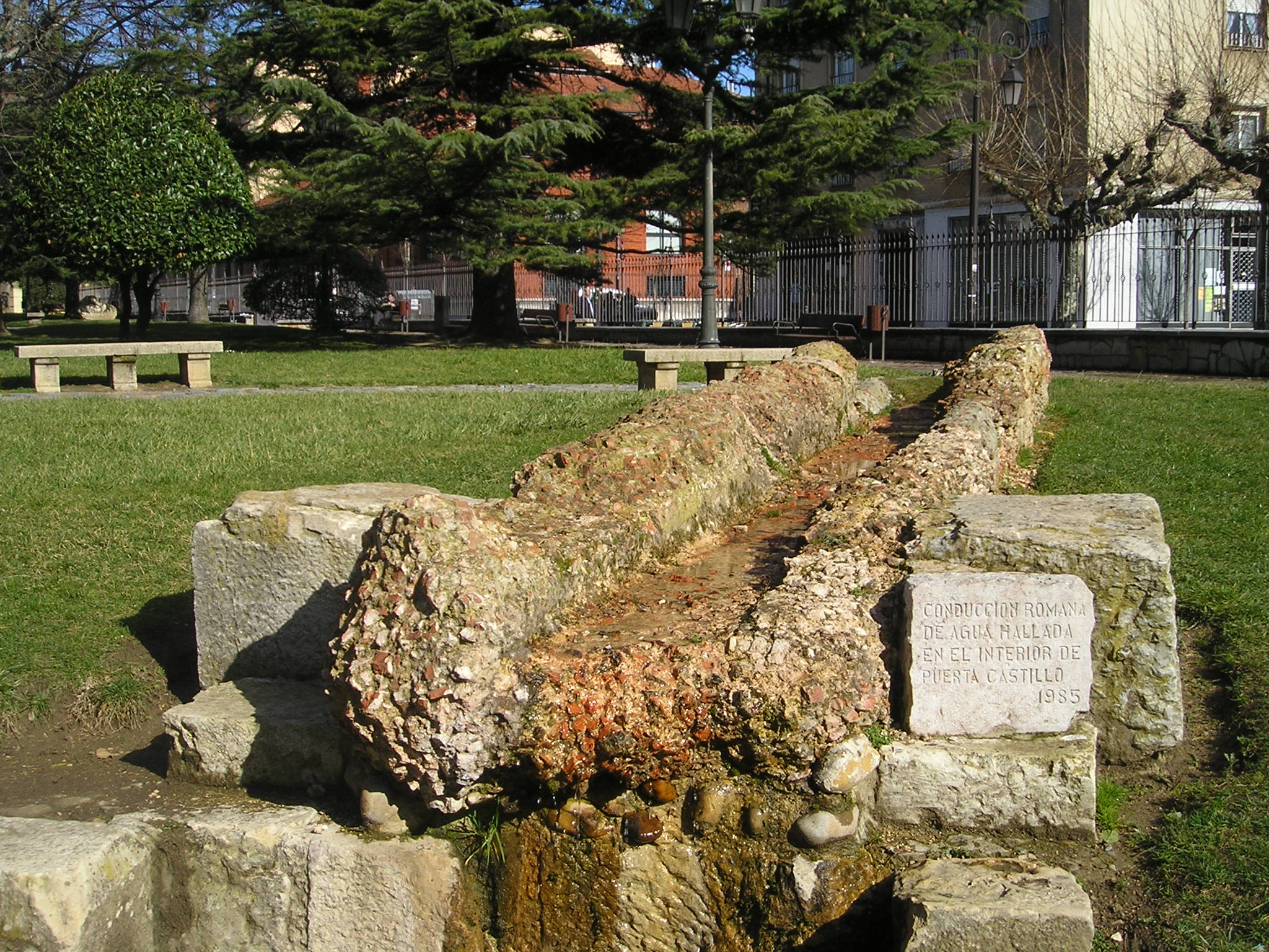 Canalización descubierta en la parte exterior del campamento de Legio VII Gemina (Actual León, España) para suministrar agua a la base legionaria